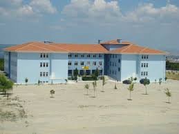 Çanakkale Fen Lisesi binası